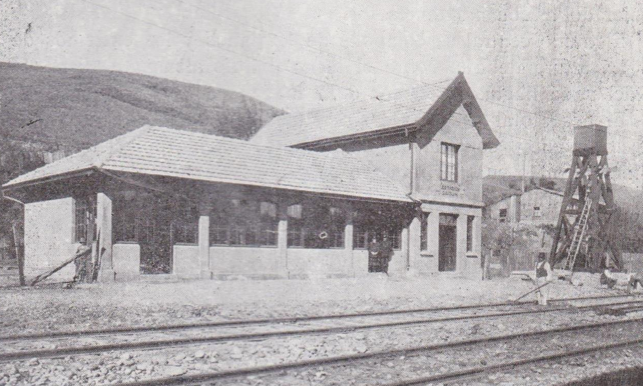 Estaciones del sur, estación de Puerto Montt. Circa 1929. Imagen obtenida a partir del libro (in Spanish) (1929) Ferrocarriles del Estado de Chile (3rd ed.), Santiago: Impr. Harris y Pascual